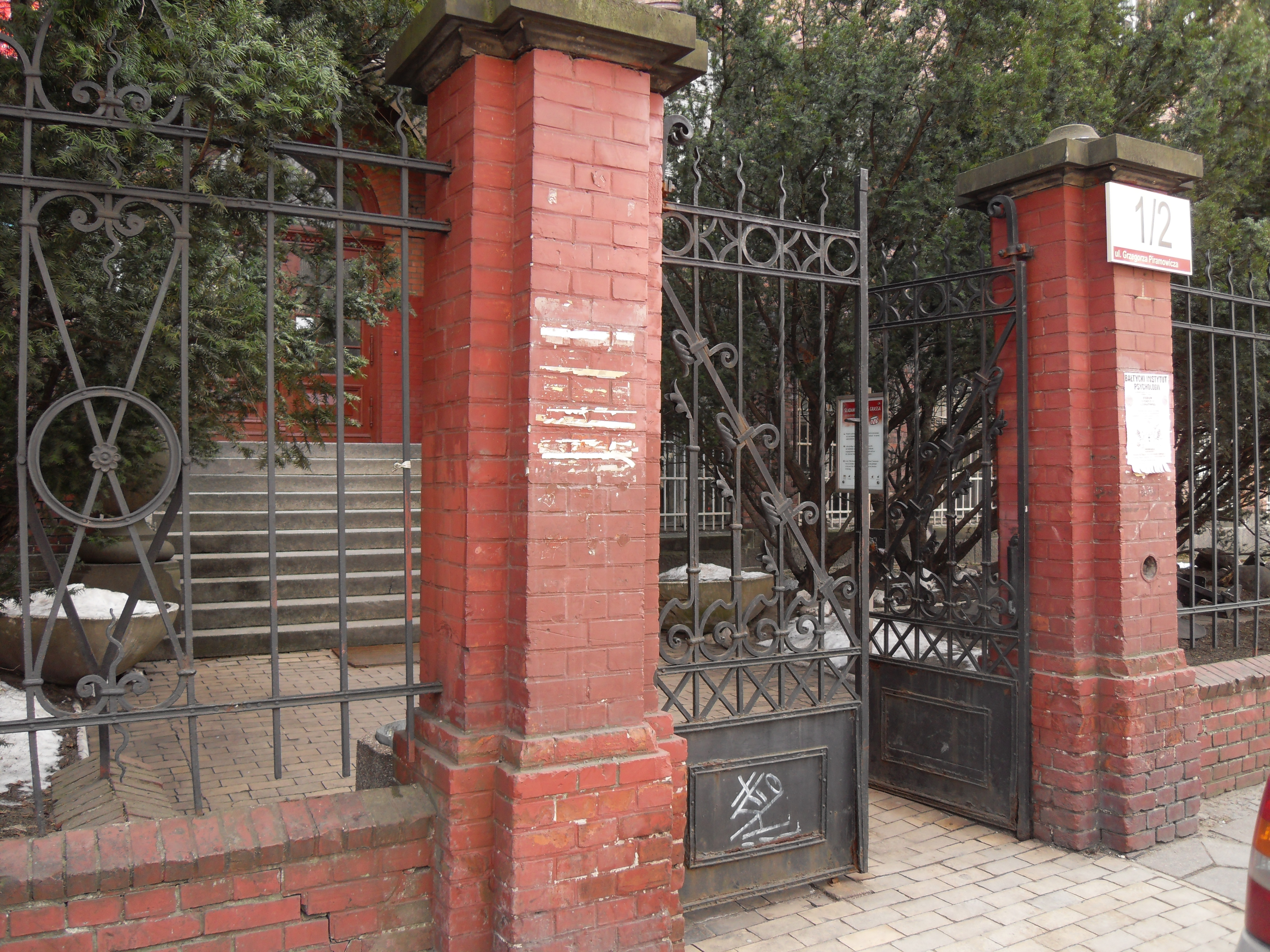 Gdańsk Wrzeszcz, szkoła Conradinum - zabytkowa bramka.